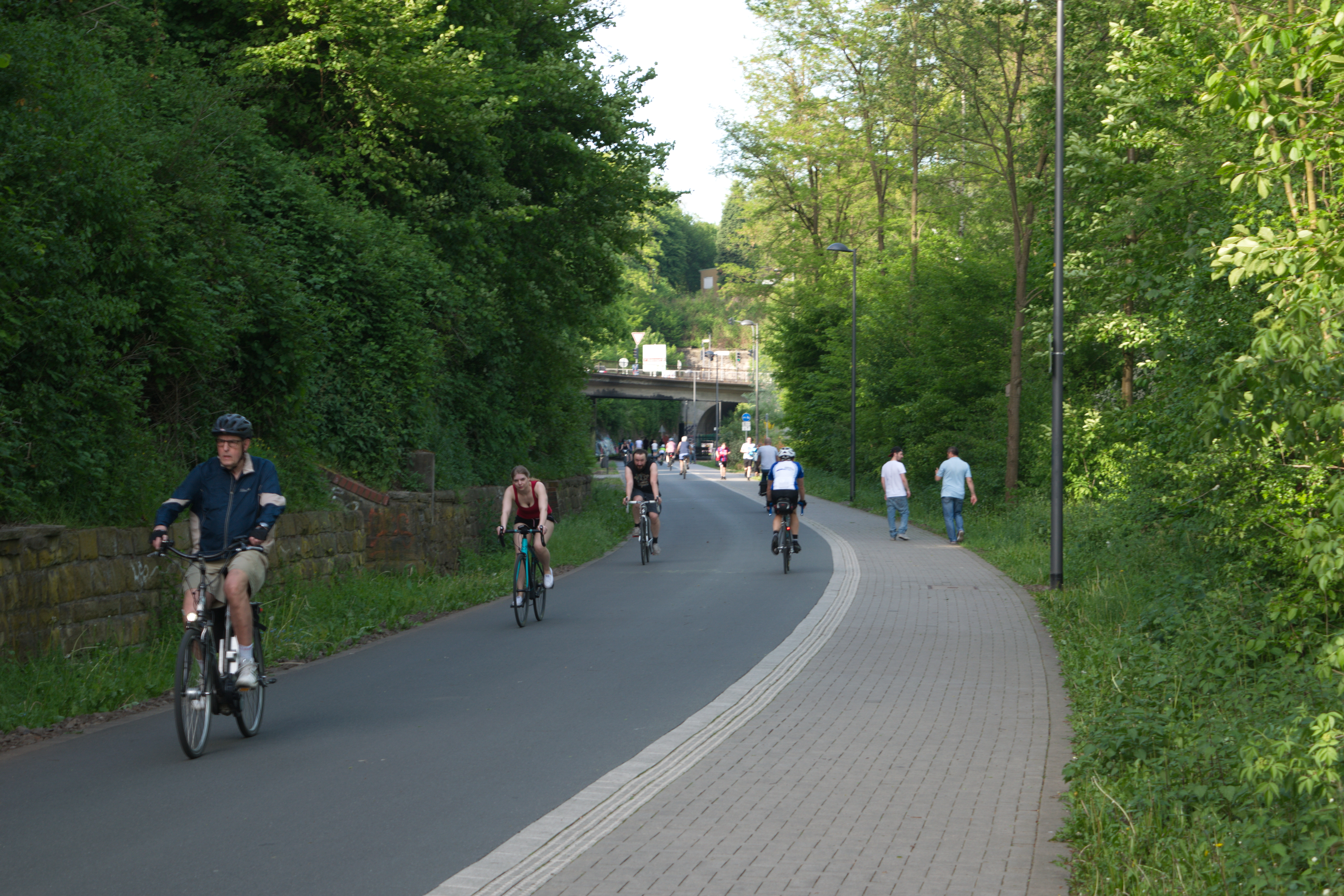 Funckstraße, Wuppertal